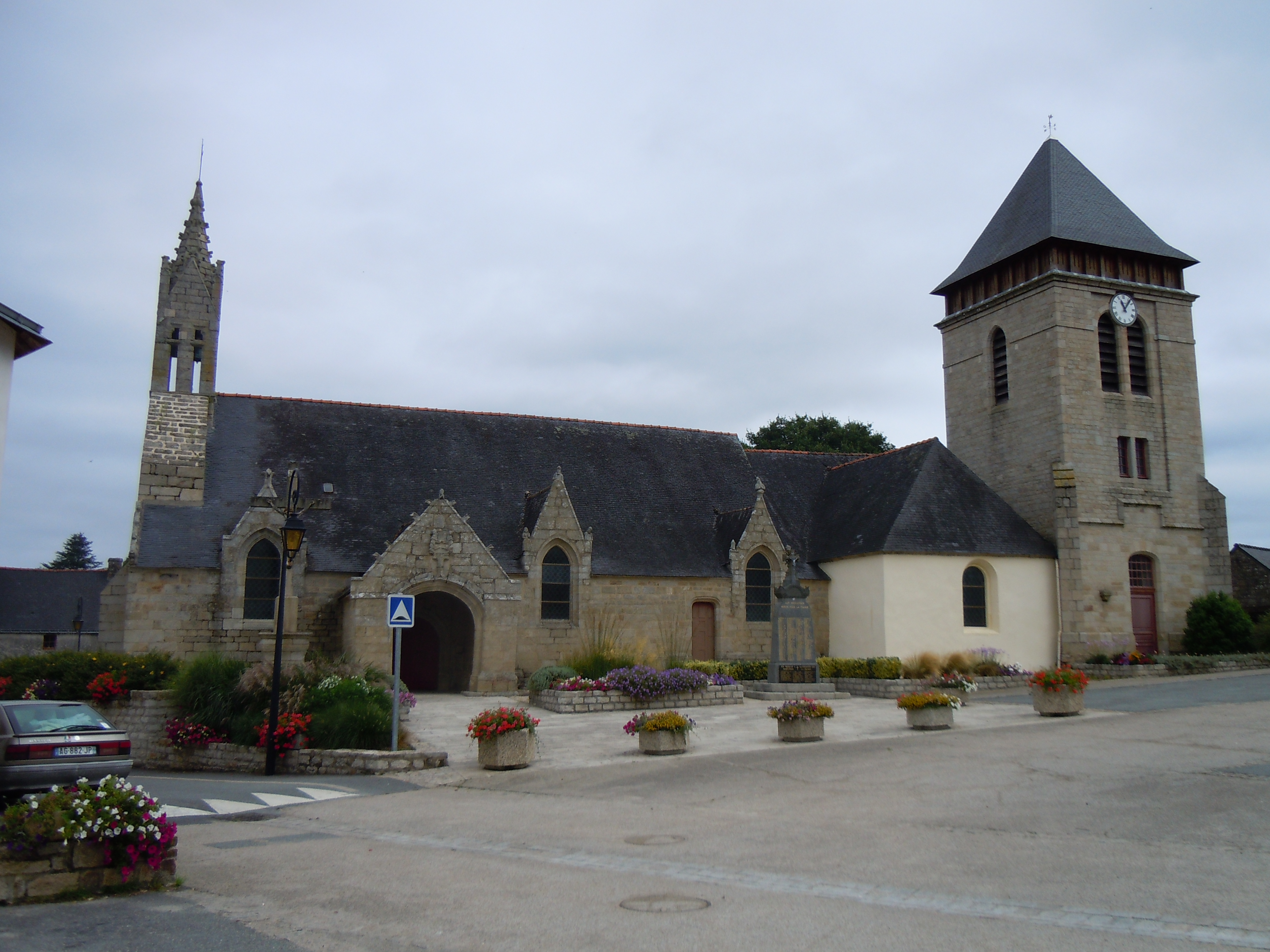 église paroissiale Saint Mélaine, commune de Meslan, département du Morbihan, France